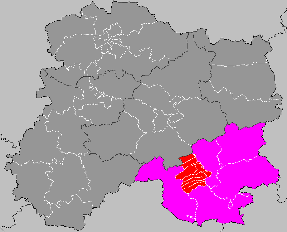 Localisation du canton de Vitry-le-François-Ouest